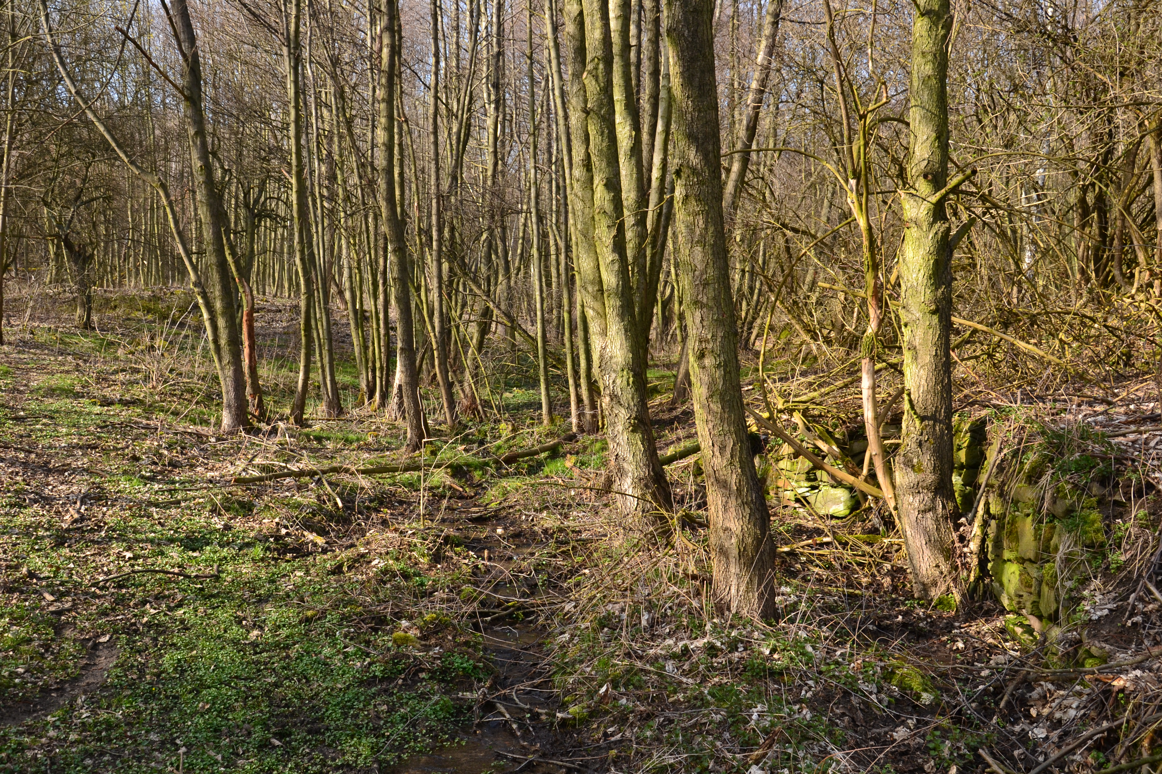 Fragmenty zdiva domů